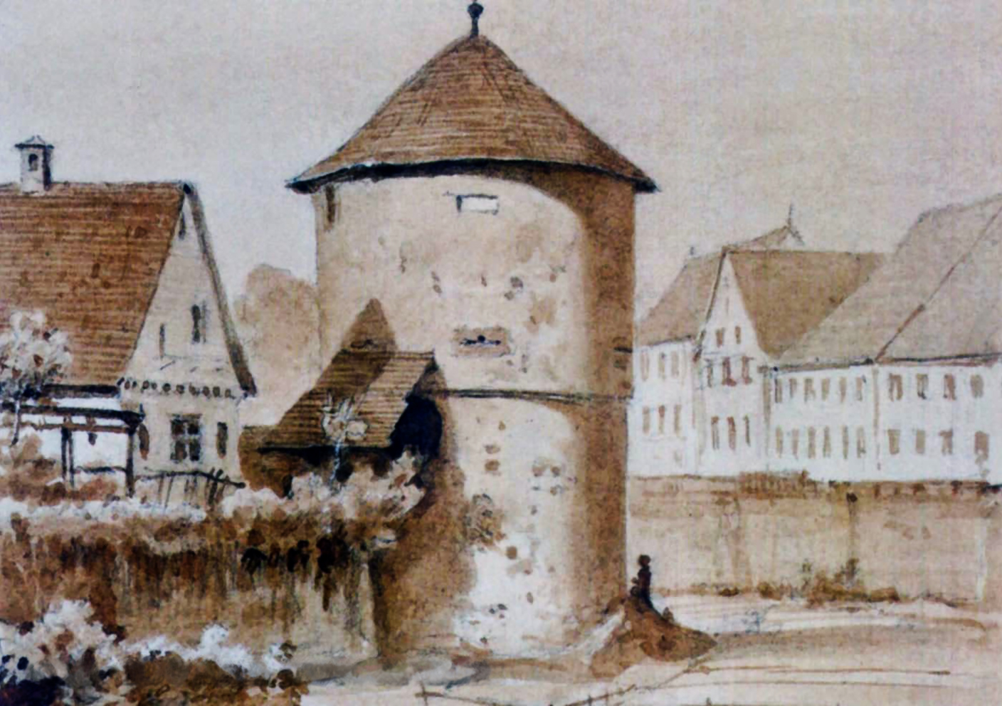 Der Eisturm in Reutlingen auf einem Aquarell von Eduard von Kallee. Er war 1877-1906 der städtische Eiskeller. Er steht am Albtorplatz neben der Jos-Weiß-Schule